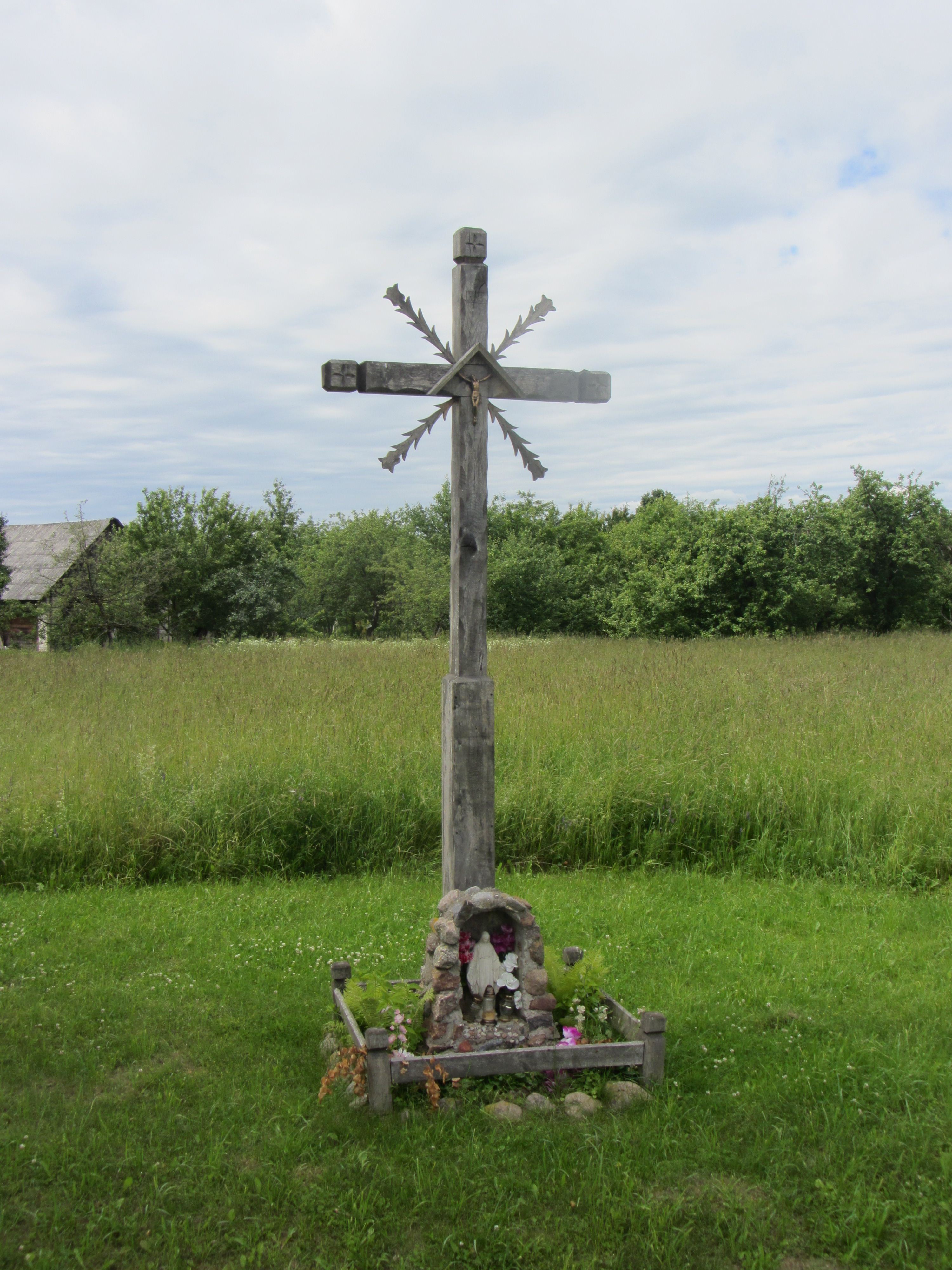 Paspėriai 19160, Lithuania